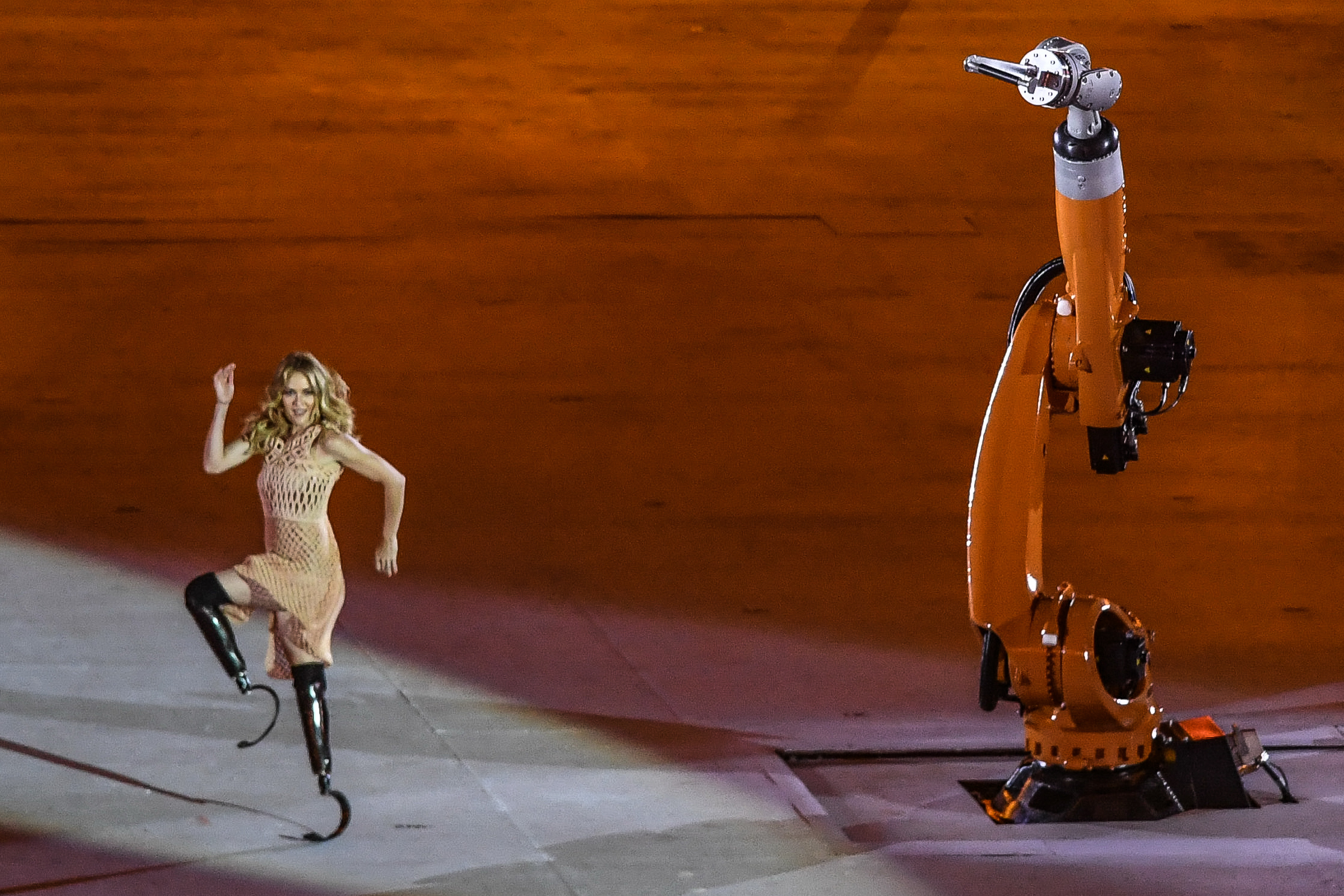 Rio de Janeiro - Cerimônia de abertura dos Jogos Paralímpicos Rio 2016 no Estádio do Maracanã